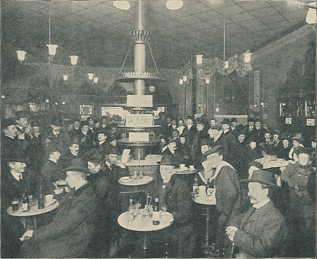 Søndag i Automat Kaféen i København omkring år 1900